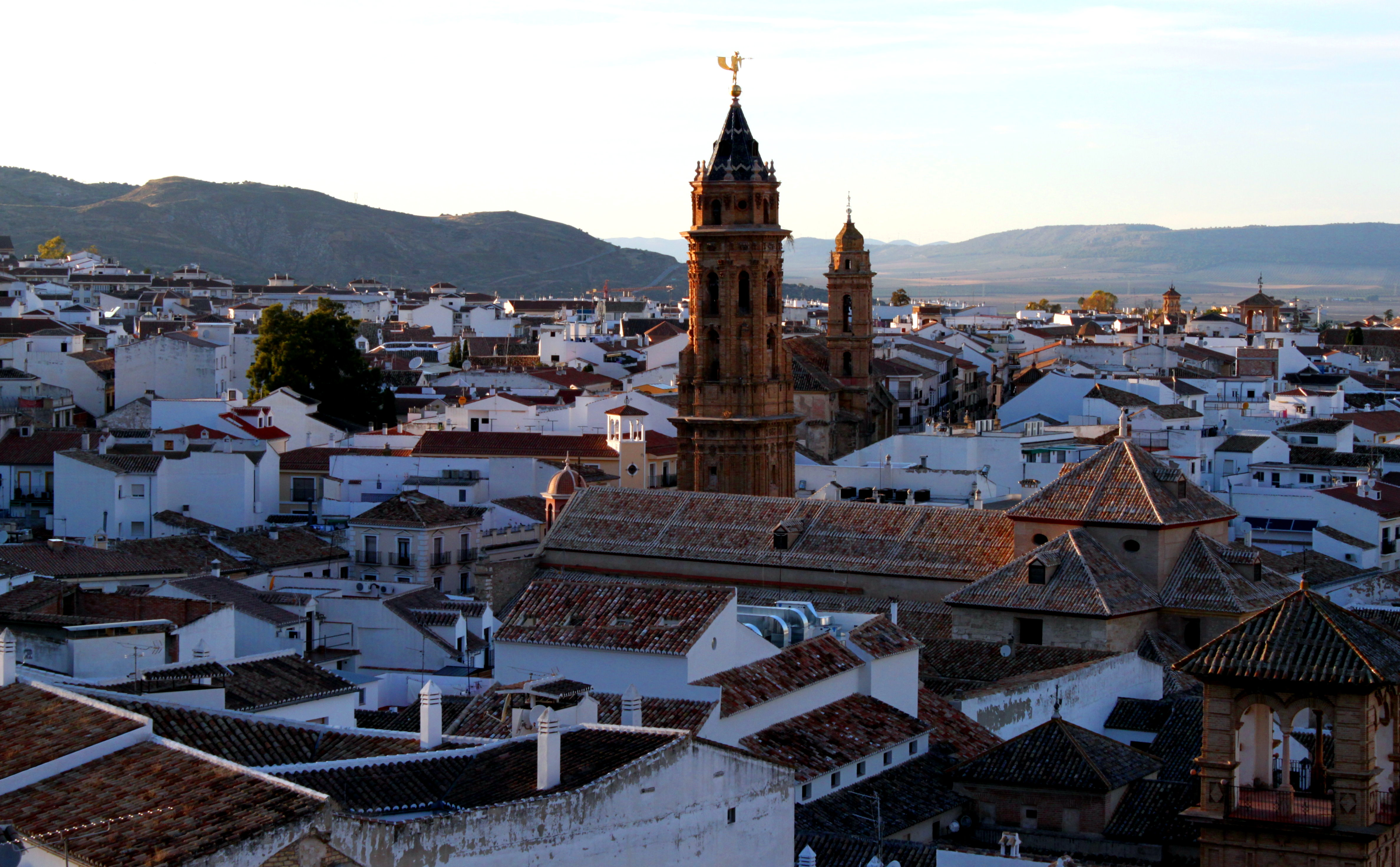 Conjunto Histórico Antequera - Málaga - Spain